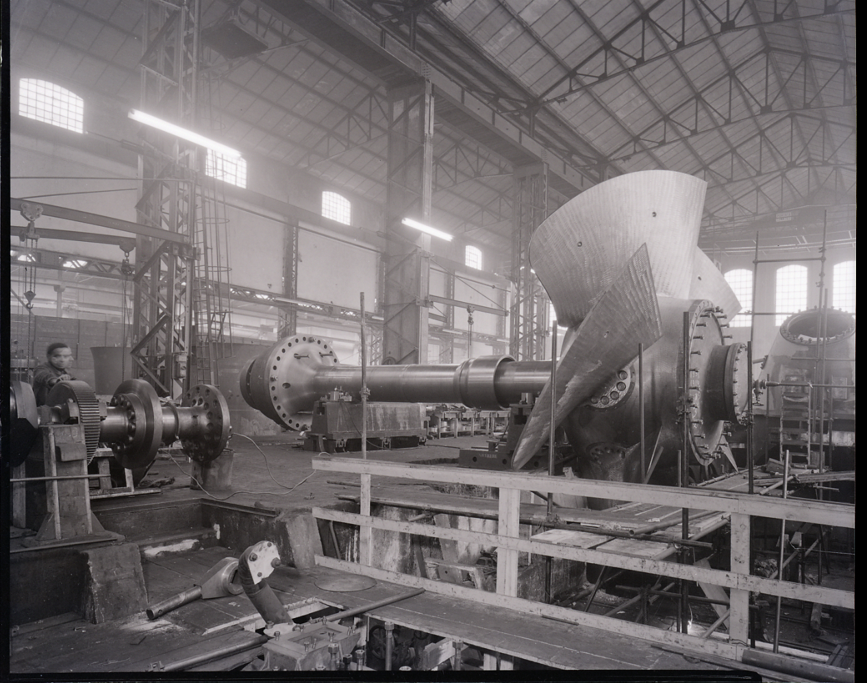 Servizio fotografico : Legnano, 1958 / Paolo Monti. - Buste: 27, Fototipi: 30 : Negativo b/n, gelatina bromuro d'argento/ pellicola ; 10x12. - ((Serie costituita da 27 buste di carta, tenute insieme da una graffetta, identificate con i numerazione: G19860/732, G19861/731, G19862, G19863, G19864, G19865, G19866-L698, G19867/68-L665, G19869/70-664L, G19871-L663, G19872-L662, G19873-L661, G19874-L660, G19875-L633, G19876-L632, G19877-L631, G19878-630, G19879/80-629, G19881-628, G19882-627, G19883-621, G19884-625, G19885-624, G19886-623, G19887-622, G19888, G19889-rz/620. - Fonte: Agenda di Paolo Monti: Foto Leica 1 / 1-51 verde, 1-110 nera (1958-1963), presso Archivio Paolo Monti